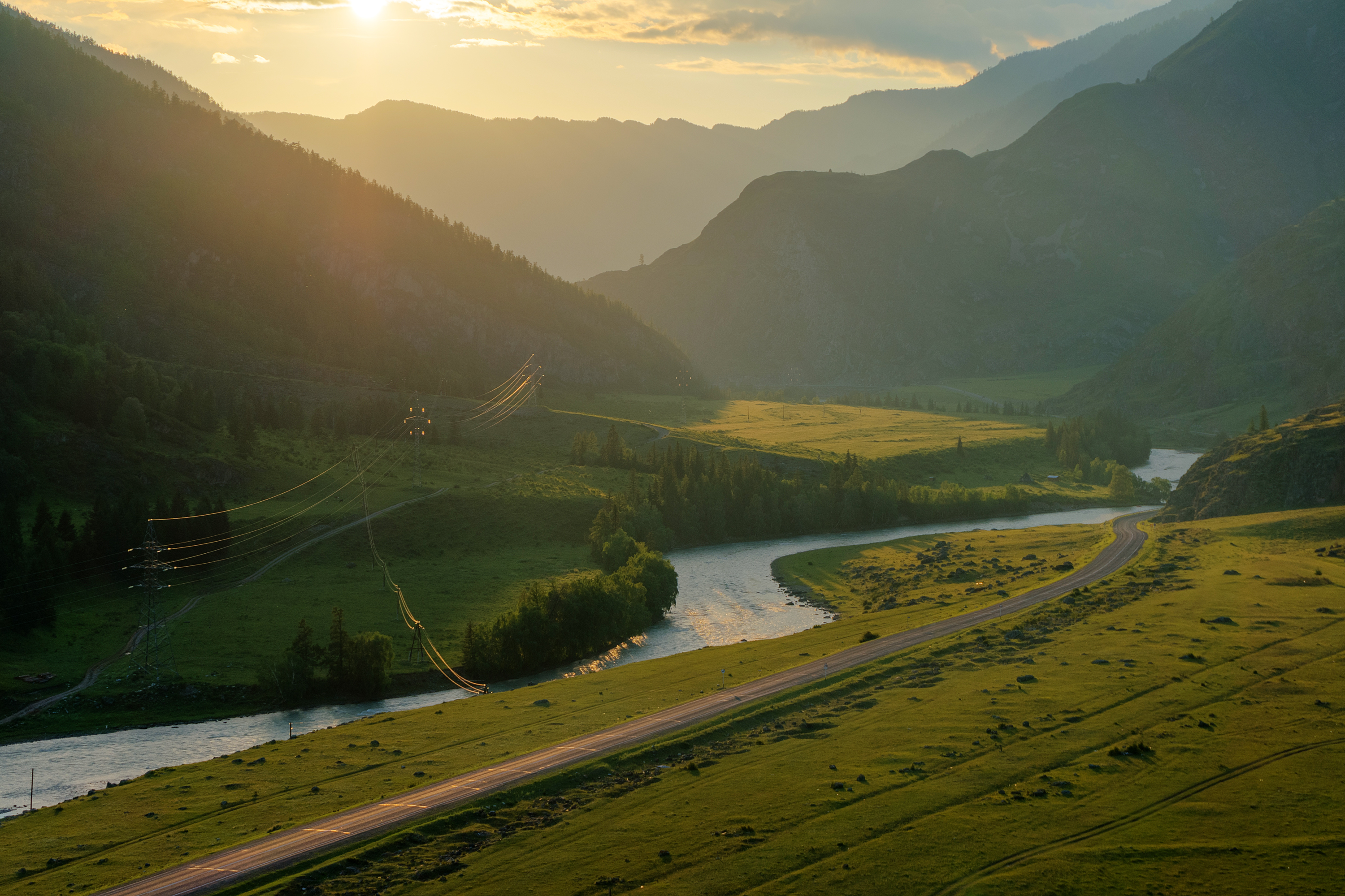 Шавлинский заказник: Кош-Агачский район, Алтай This image is related to the protected area of Russia number 0410008